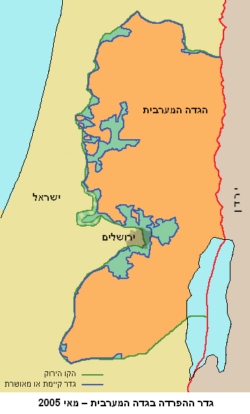 גדר ההפרדה בגדה המערבית, מאי 2005. תרגום לעברית של :תמונה:BarrierMay2005.png